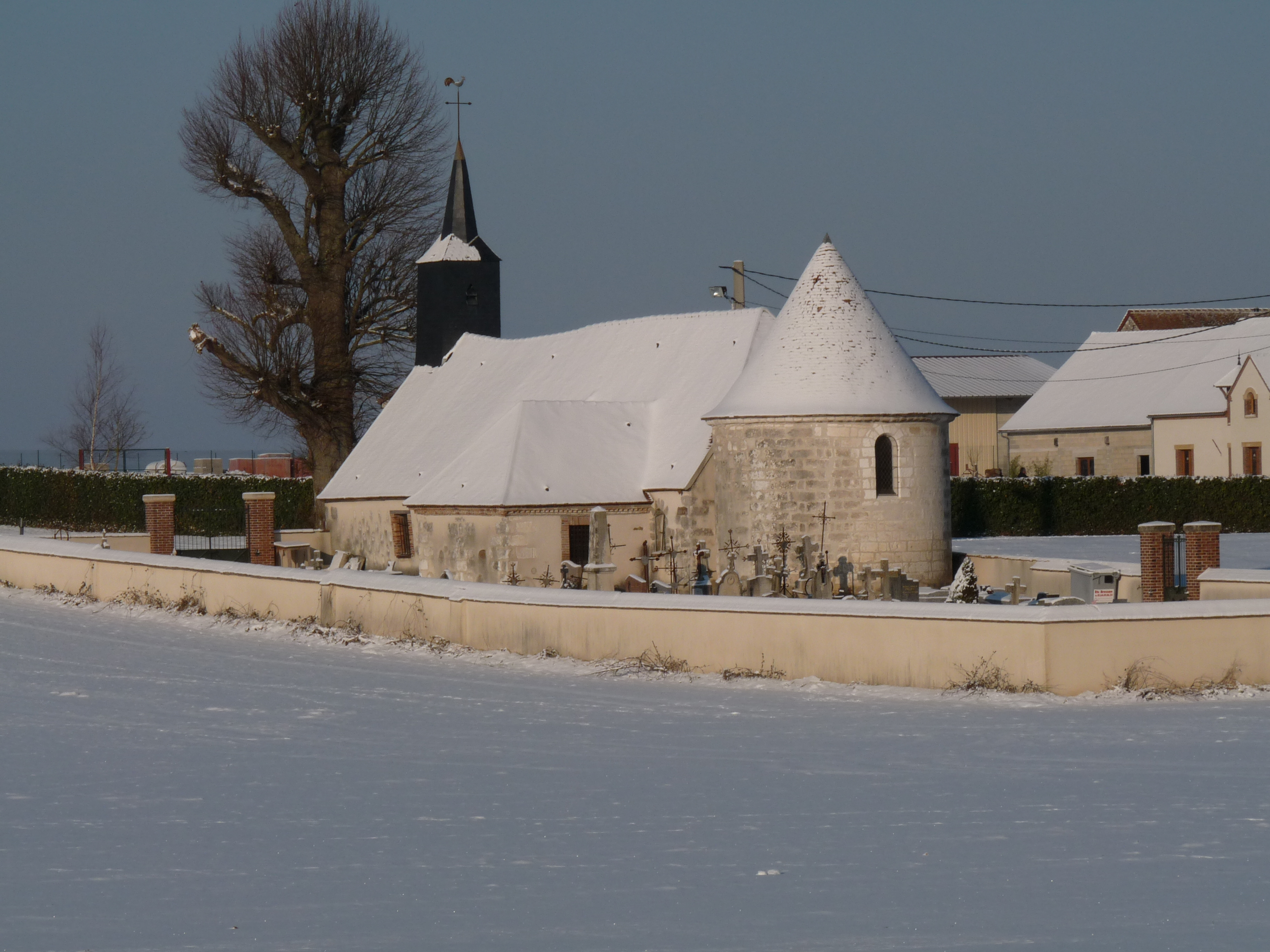 Église Saint Anne sous la neige - Baby (Seine-et-Marne)